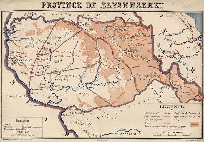 Carte de la province de Savannakhet (Laos) en 1925 ; oeuvre du service géographique de l'Indochine (Hanoï) ; original en couleur ; 93 x 67 cm ; échelle(s) : 1:300 000.